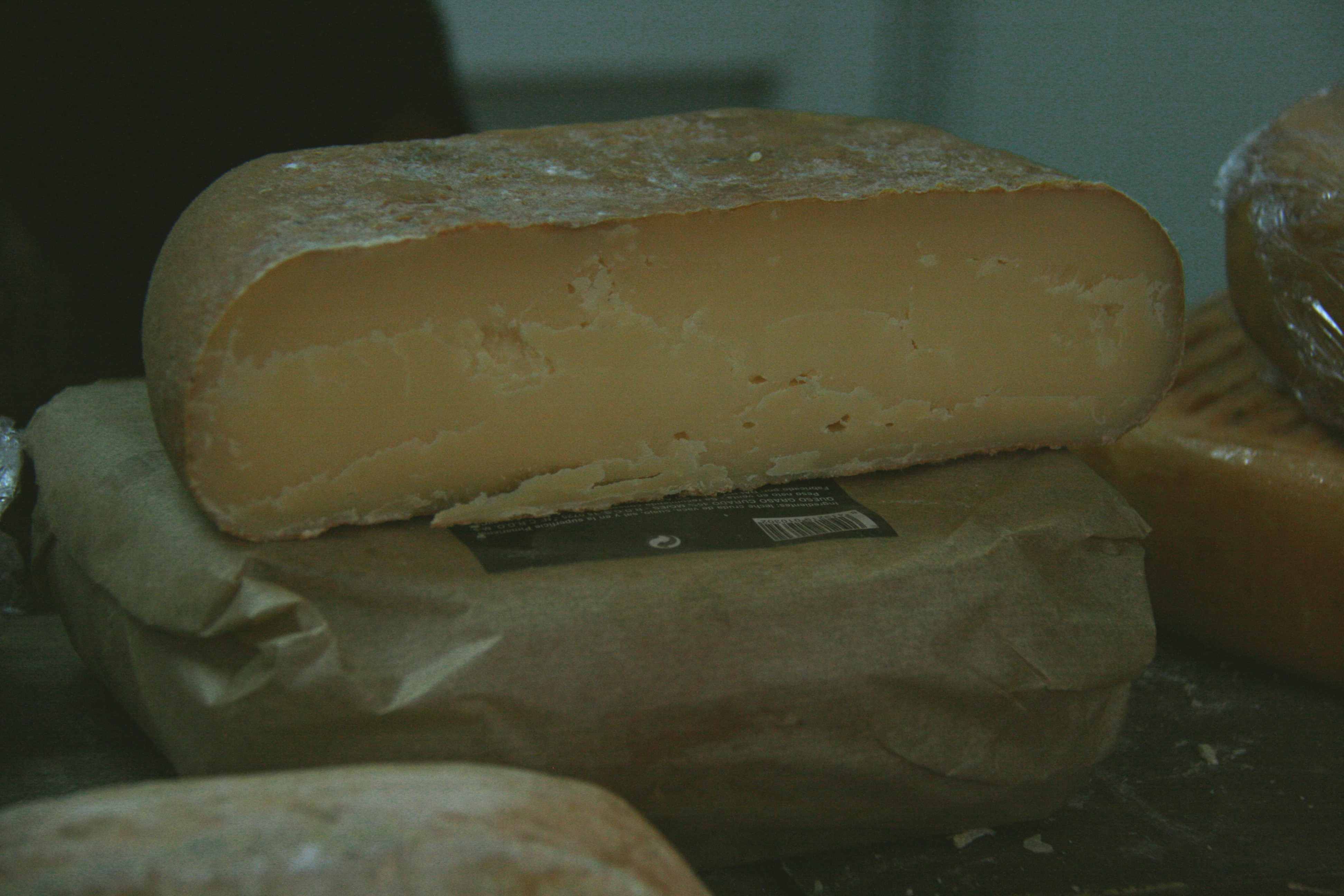 Queso mallorquín (leche de vaca curado un año)